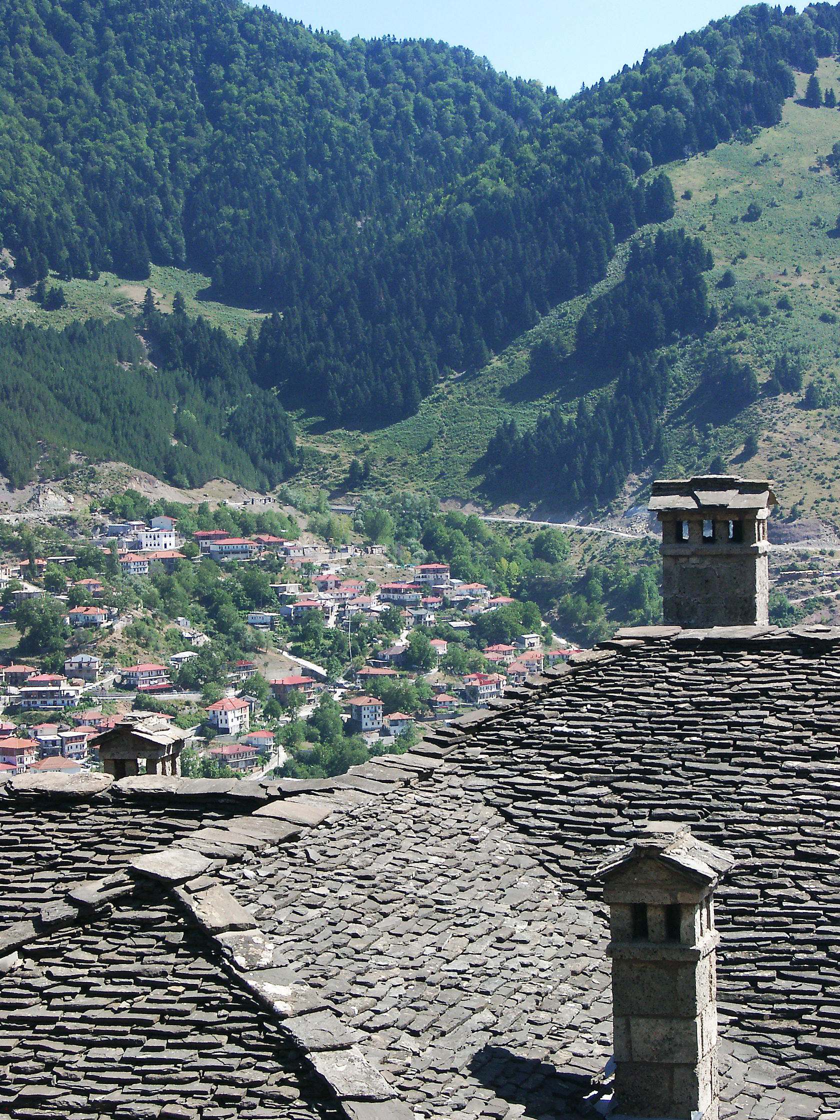 Metsovo, Greece